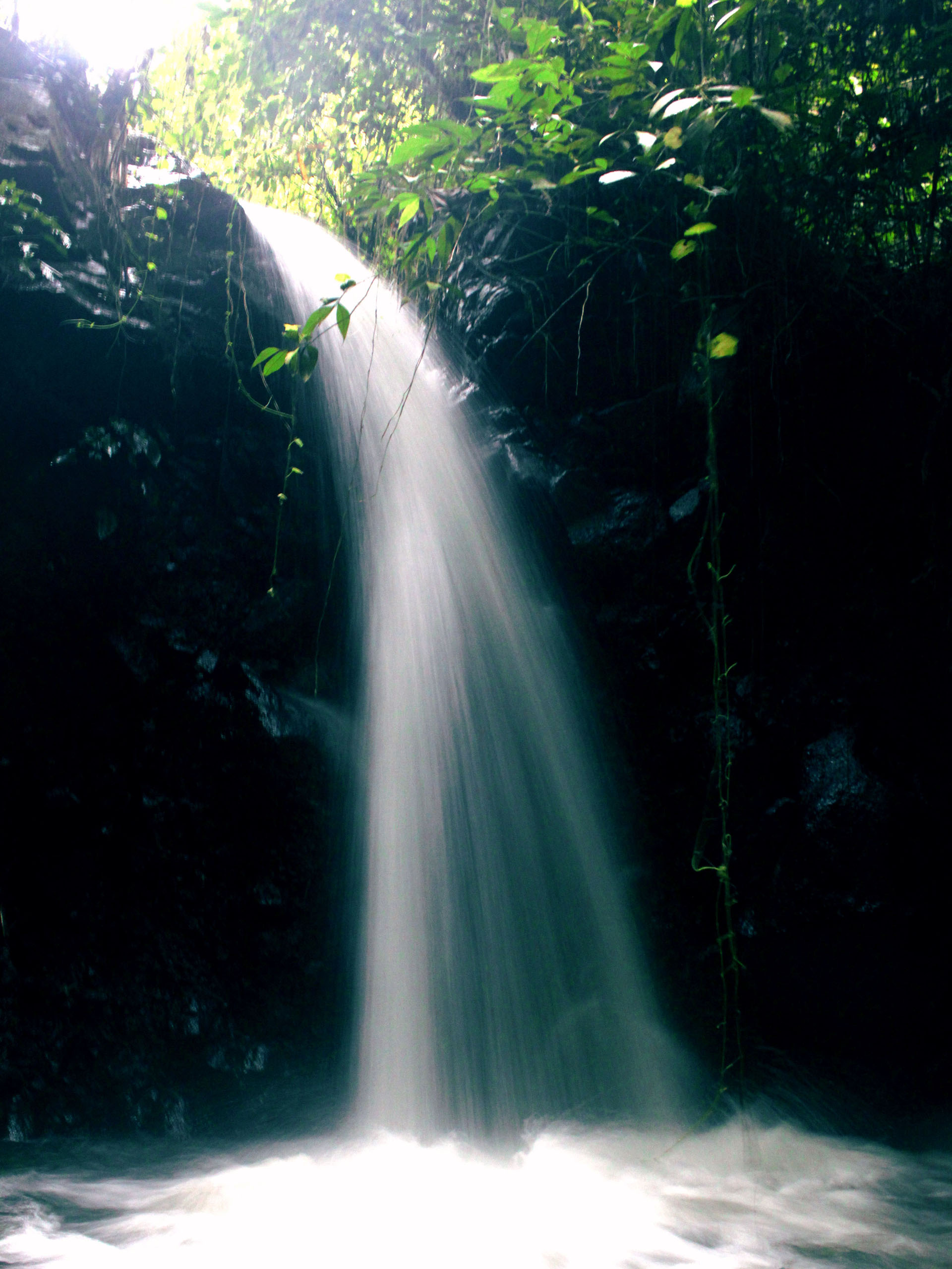 Pemandangan Air Terjun di Warembungan